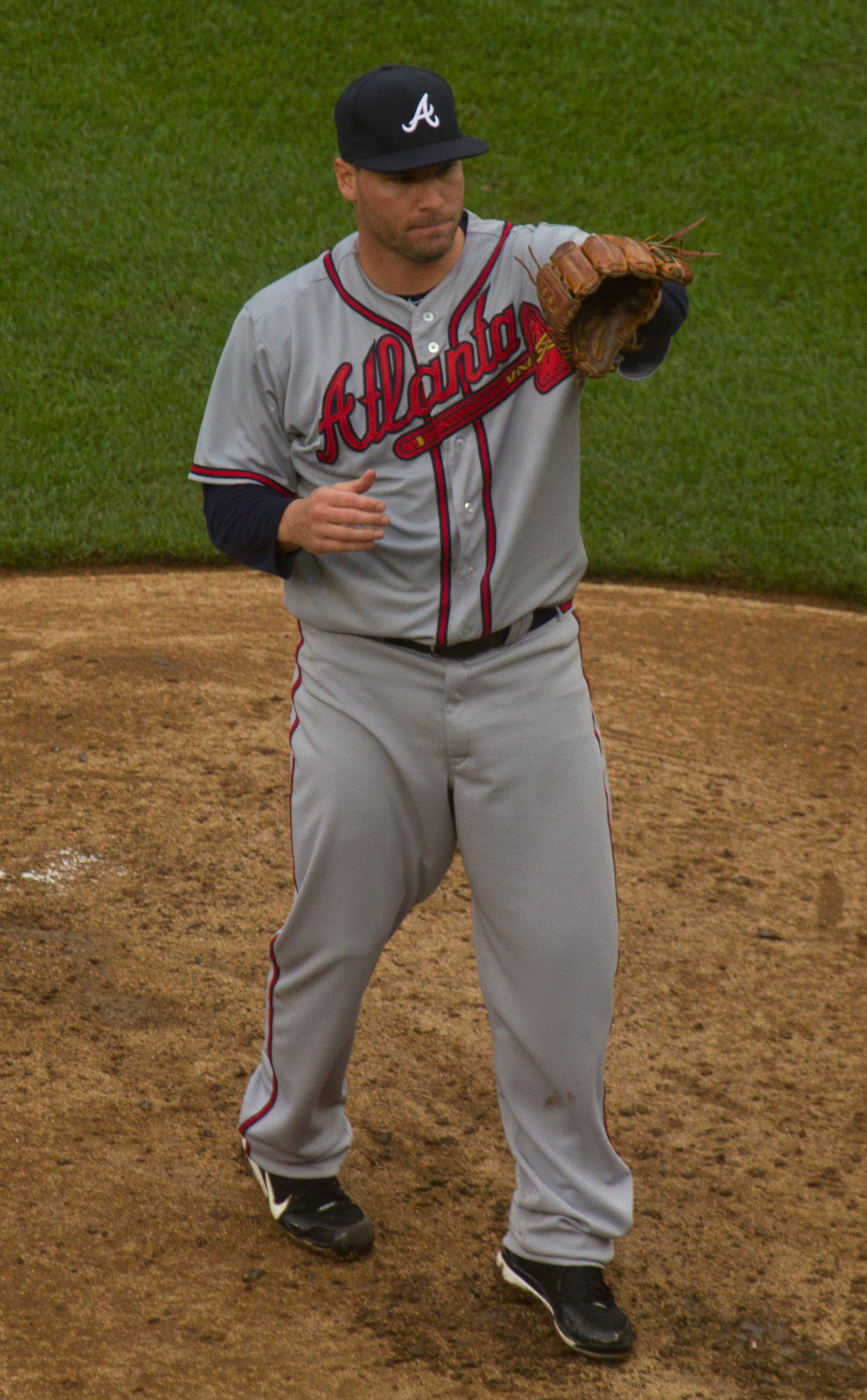 Ben Sheets